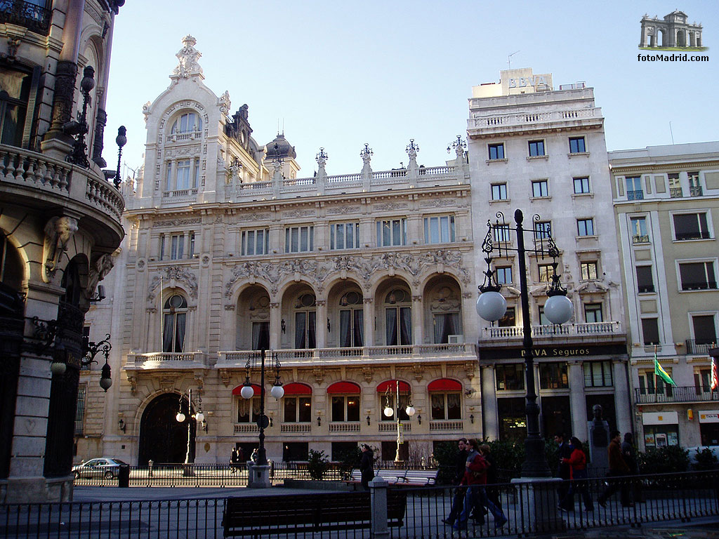 Fachada del Casino de Madrid en la calle de Alcalá, esta calle de apenas treinta metros de longitud muestra un especacular edificio, la fachada es de estilo modernista.